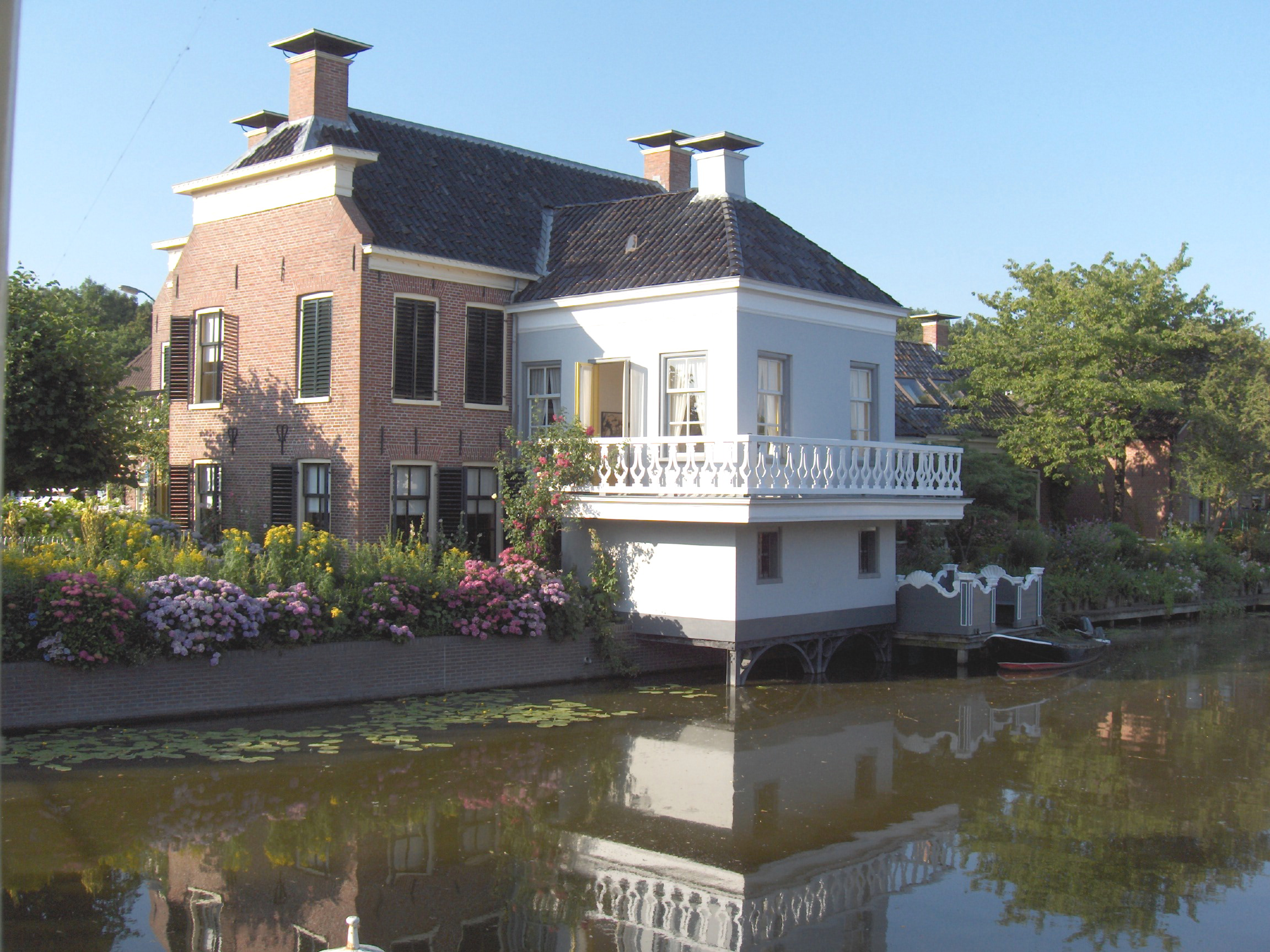 Onderdendam, la antaŭa prizono super la Winsumerdiep.